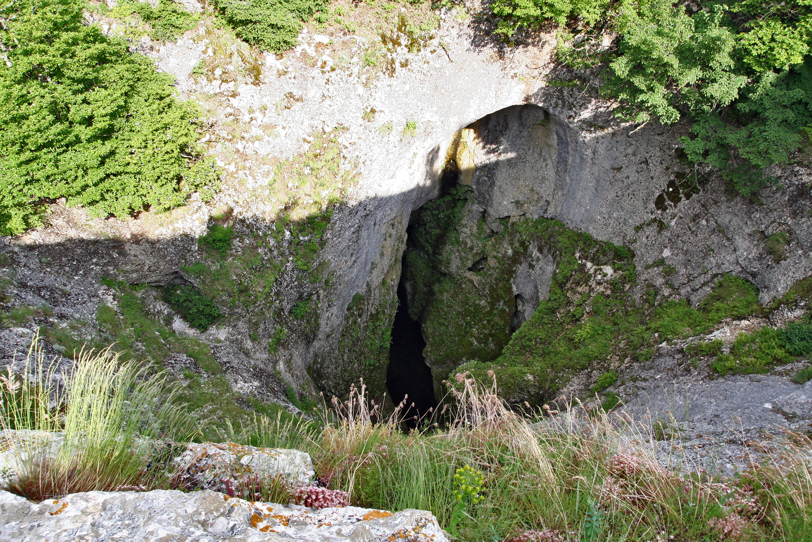 Топсюс-Хосар - фото сделано с западной части воронки